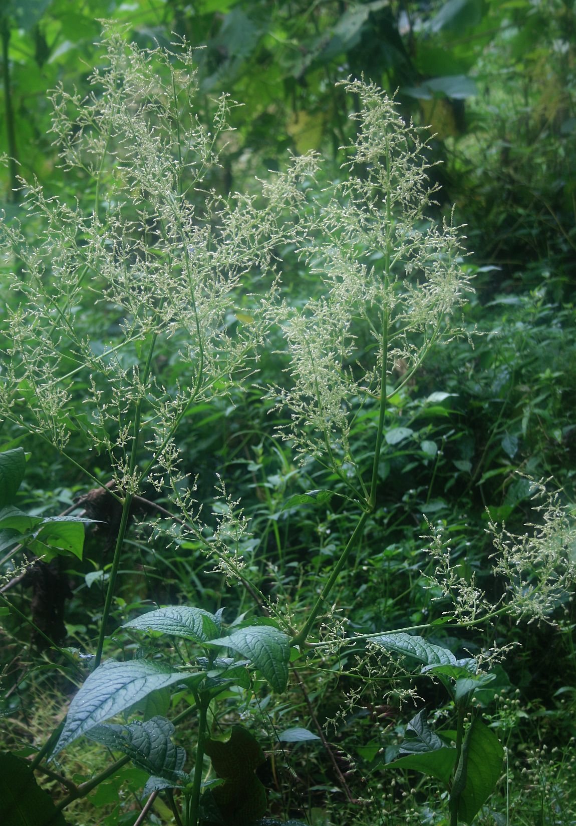 Iresine_diffusa, Fuchsschwanzgewächse (Amaranthaceae) – Kolumbien/Colombia: Dpto. Huila, Estrecho del Magdalena, ca. 5,5 km NW San Agustín, ca. 1480 m